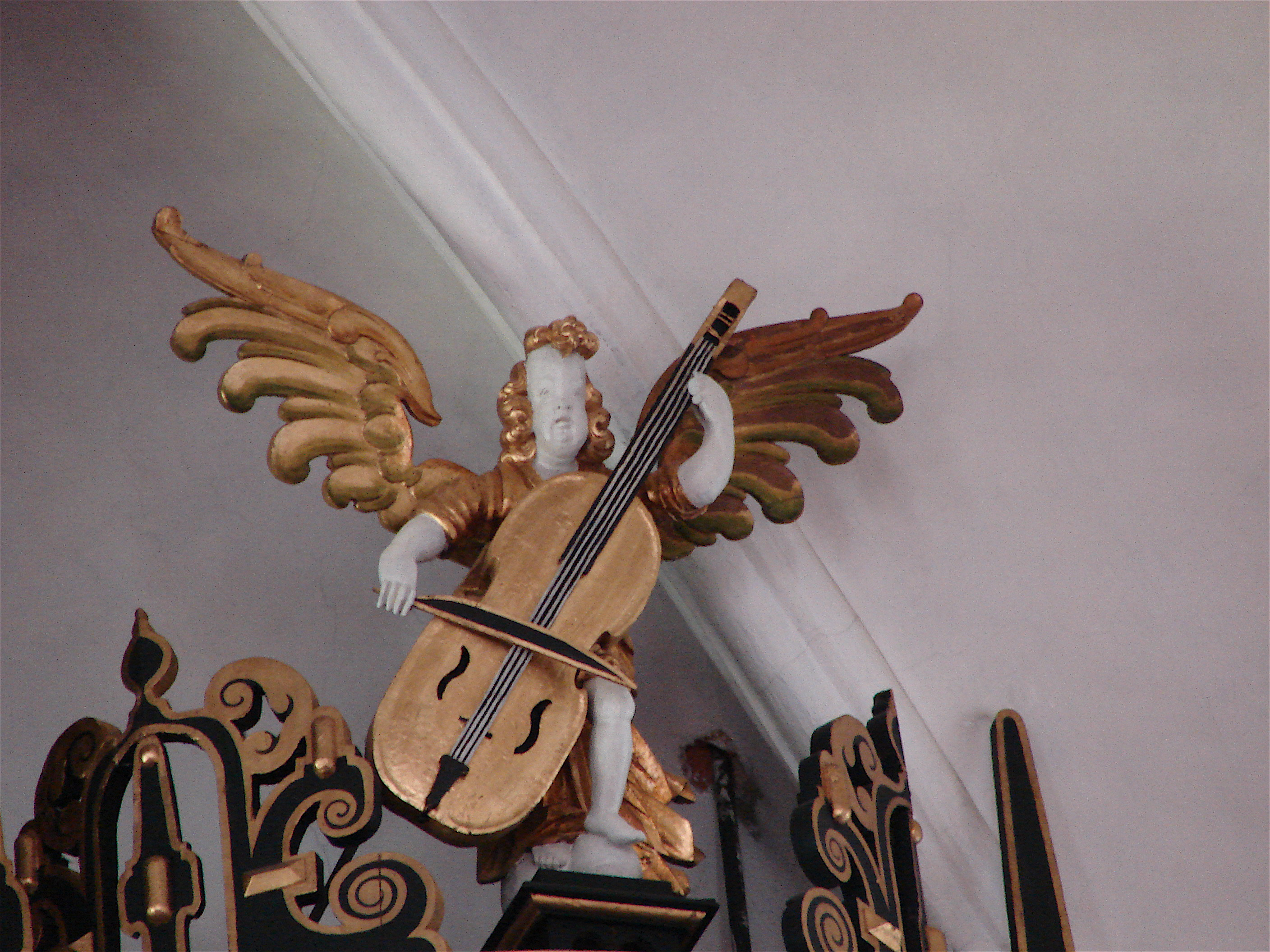 Trefoldighedskirken Christianstad, Kristianstad, detalje fra orgelet, Johan Lorentz